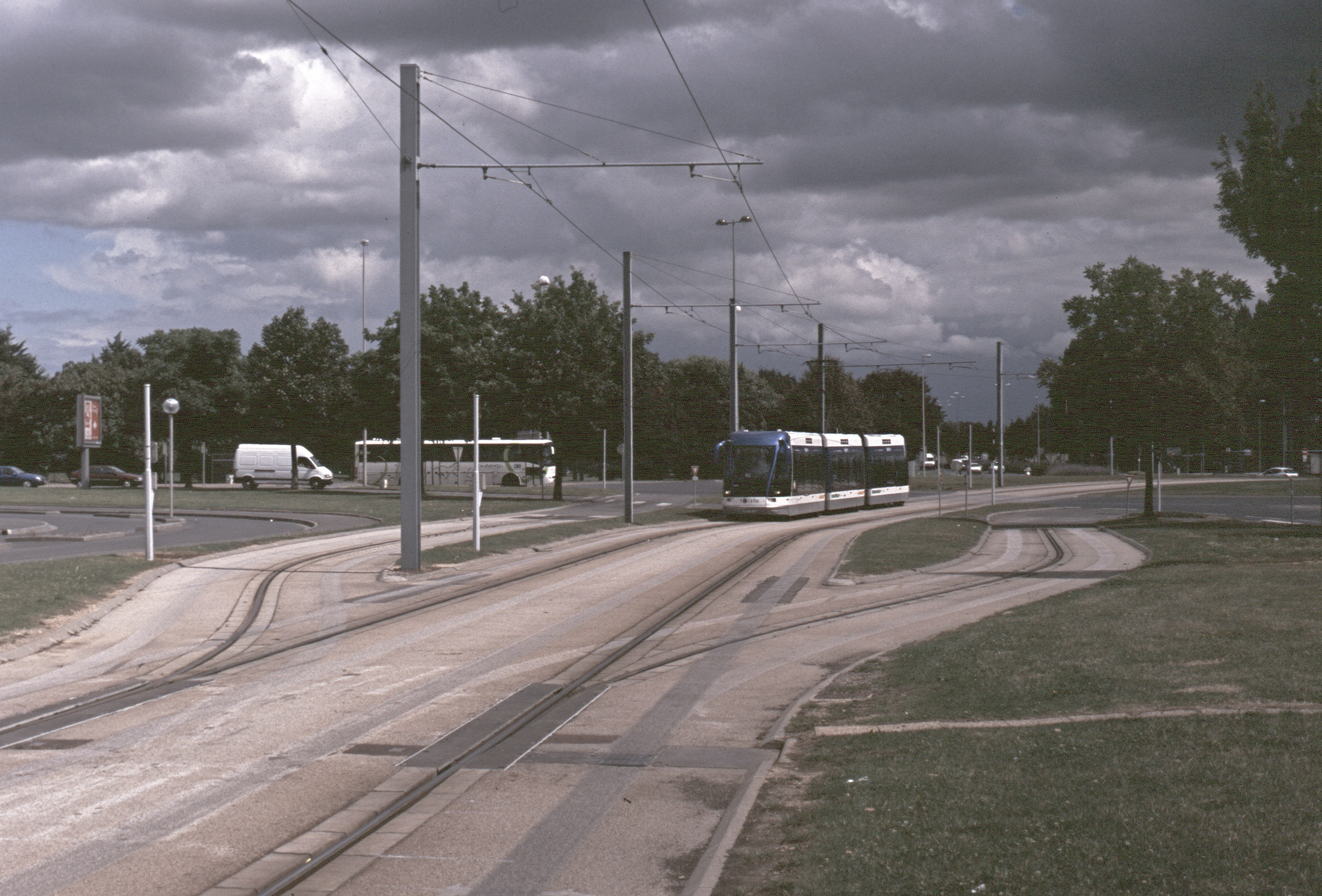 Ein- und Ausfädelstelle des Oberleitungsbus Caen am Boulevard Maréchal Juin